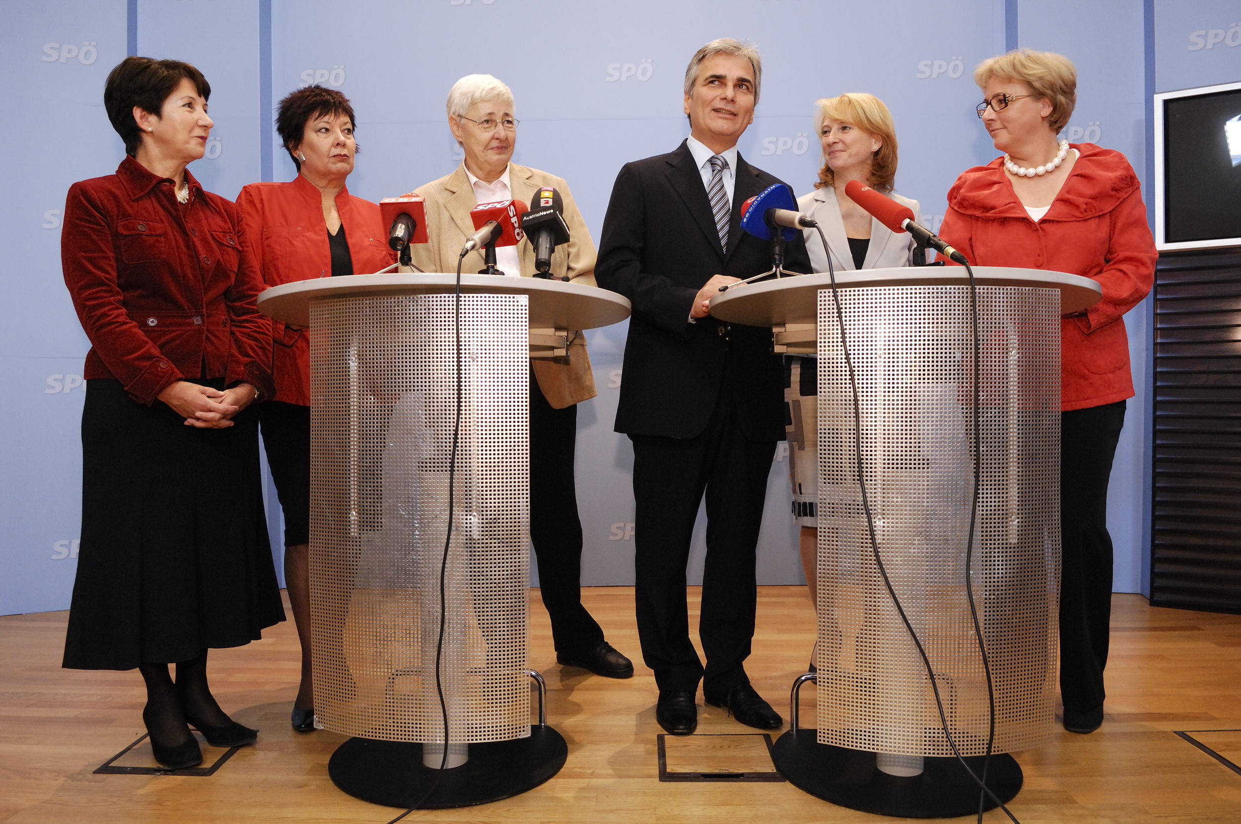 SPÖ-Vorsitzender, Spitzenkandidat Werner Faymann, die ehemaligen SPÖ-Frauenministerinnen Johanna Dohnal, Helga Konrad, Nationalratspräsidentin Barbara Prammer, SPÖ-Bundesgeschäftsführerin Doris Bures sowie die amtierende Frauenministerin Heidrun Silhavy nehmen in einer gemeinsamen Pressekonferenz zum Thema "Konzepte für eine moderne Frauenpolitik" teil. Wien, 22.09.2008© Thomas Jantzen/SPÖ